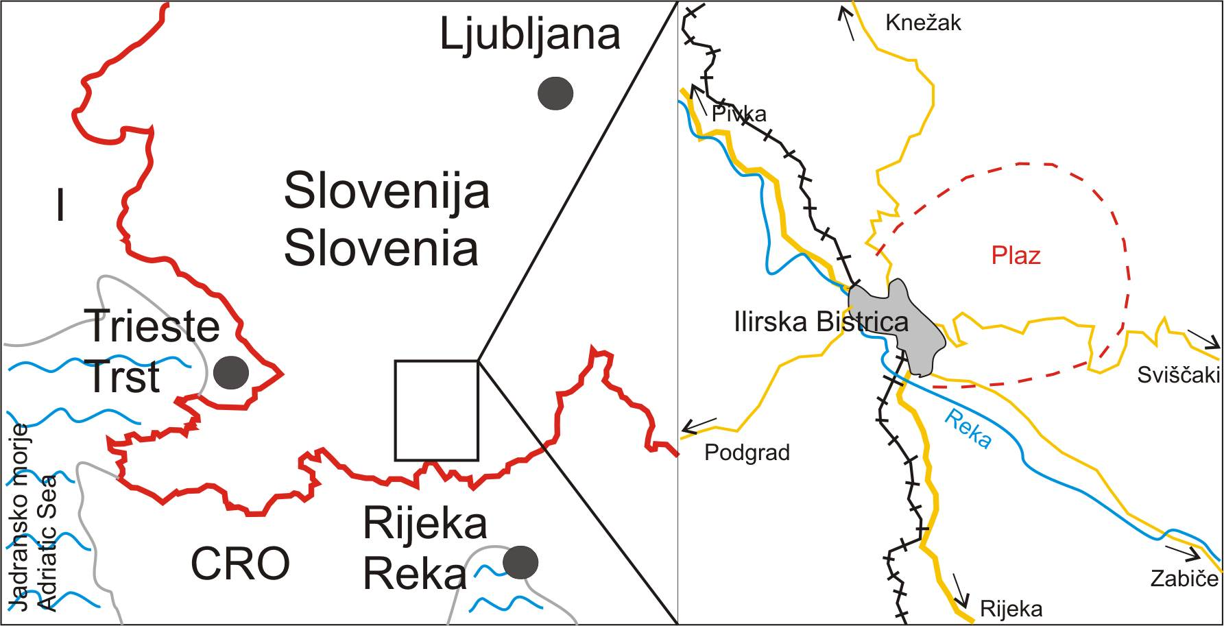 Lokacija ilirskobistriskega plazu v Sloveniji